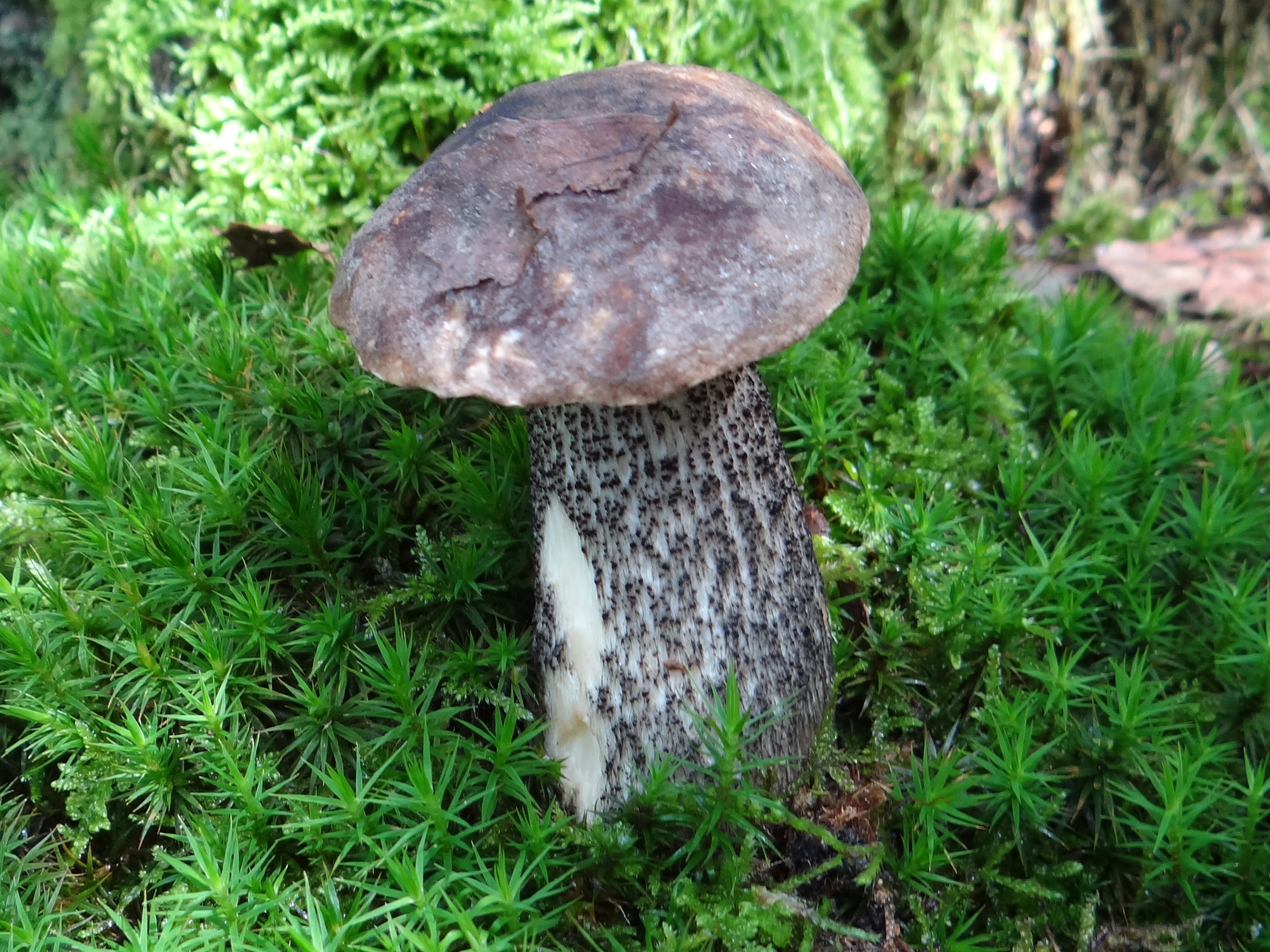 Leccinum variicolor (location:Poland, Rajbrot)